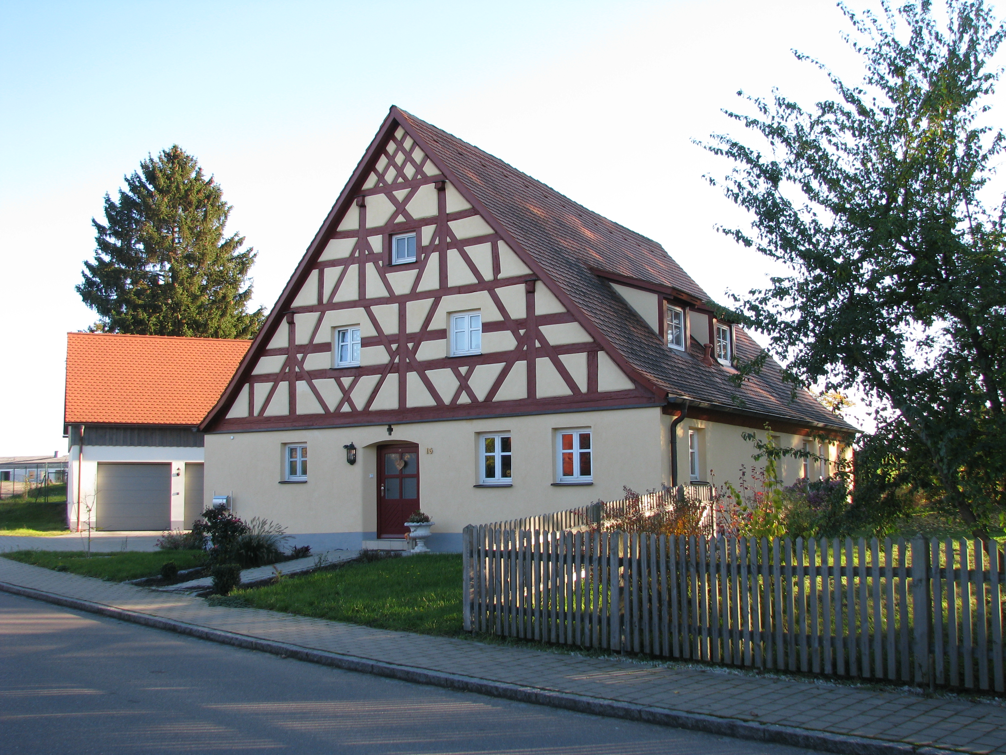 Pierheim, Ortsteil von Hilpoltstein im mittelfränkischen Landkreis Roth in Bayern, Fachwerkhaus